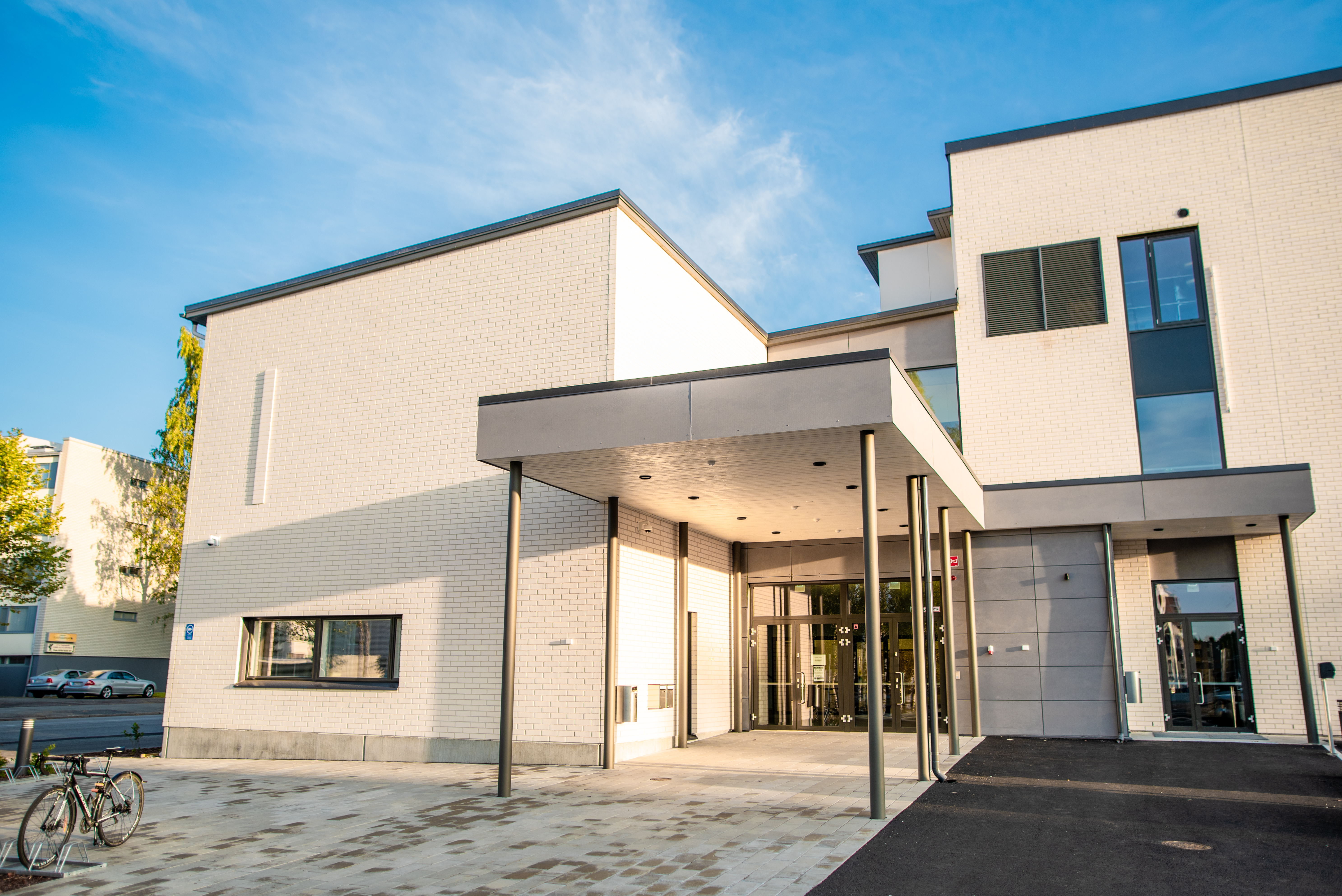 Seinäjoen vapaaseurakunnan uusi kirkkorakennus Koulukadulla.